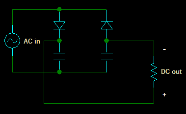 Illustration de l'article sur les ponts de redressement capacitifs